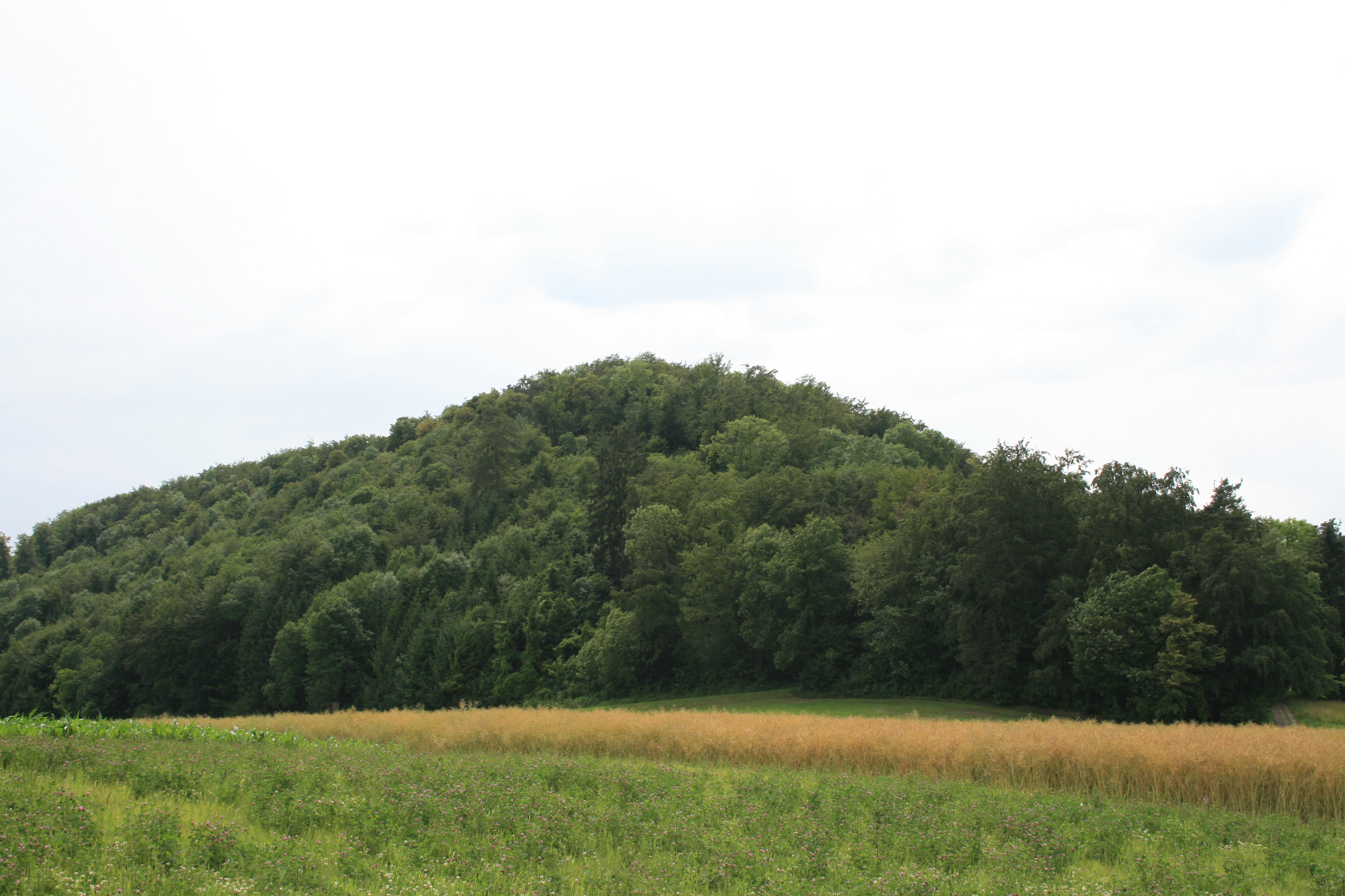 Iberg, Riniken AG, Schweiz